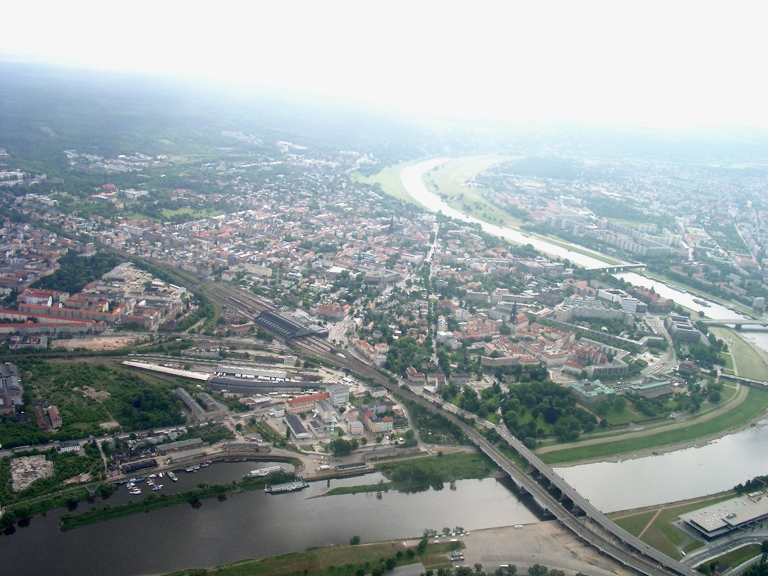 Luftbild der Dresdner Neustadt (Innere und Äußere) und der Leipziger Vorstadt; auf der anderen Elbseite sieht man noch die Johannstadt. Außerdem sind die vier innerstädtischen Brücken Albertbrücke, Carolabrücke, Augustusbrücke und Marienbrücke (eigentlich zwei separate Brücken für Auto- und Schienenverkehr) zu sehen. Der Neustädter Bahnhof und Albertplatz (sternförmige Kreuzung) bilden weitere markante Bildpunkte.